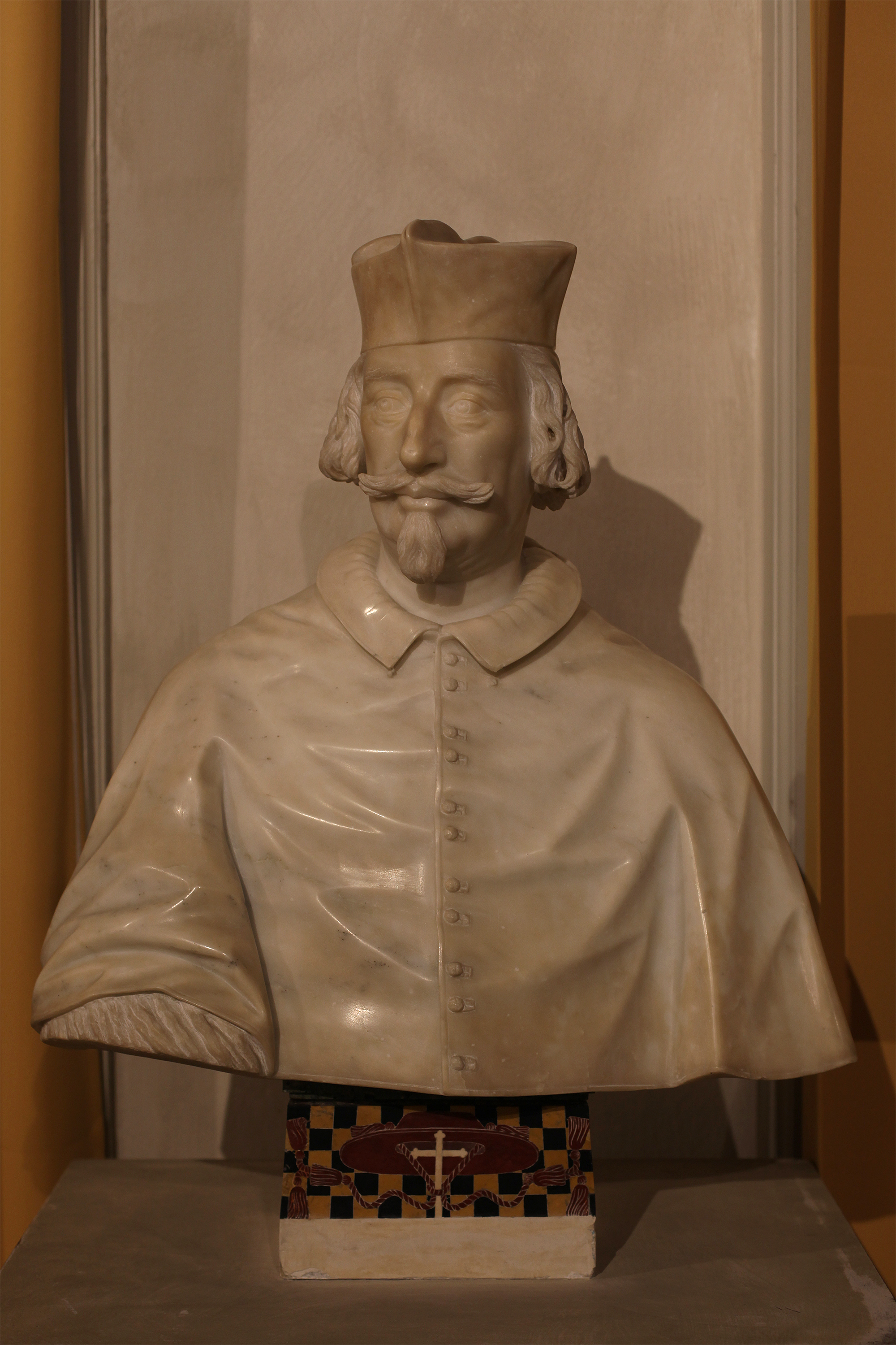 Giuseppe Vismara (1633-1703) Busto di Alfonso Litta (1700 circa), marmo, Palazzo Morando, Milano